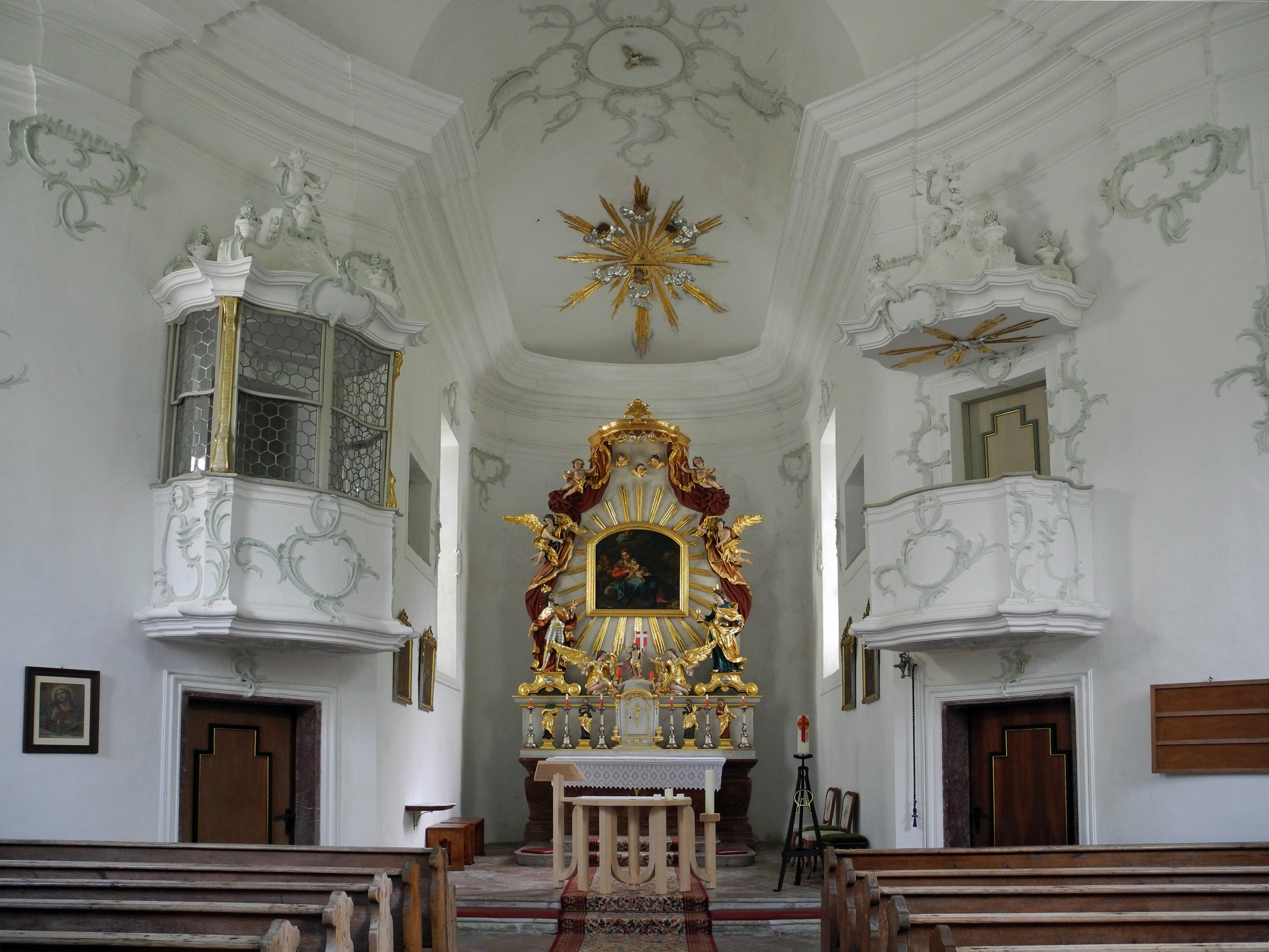 Innenraum der katholischen Filialkirche Maria Bruneck am Pass Lueg